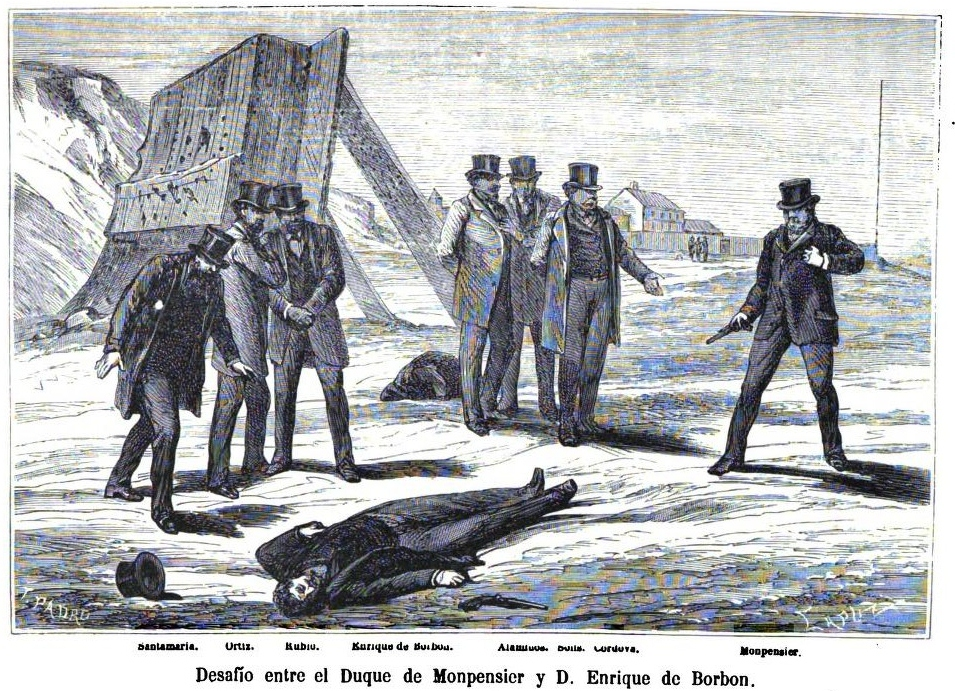 Desafío entre el Duque de Monpensier y D. Enrique de Borbón